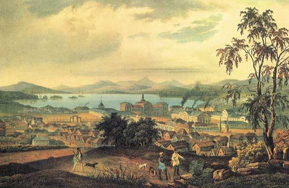 Верх-исетский завод в 1828